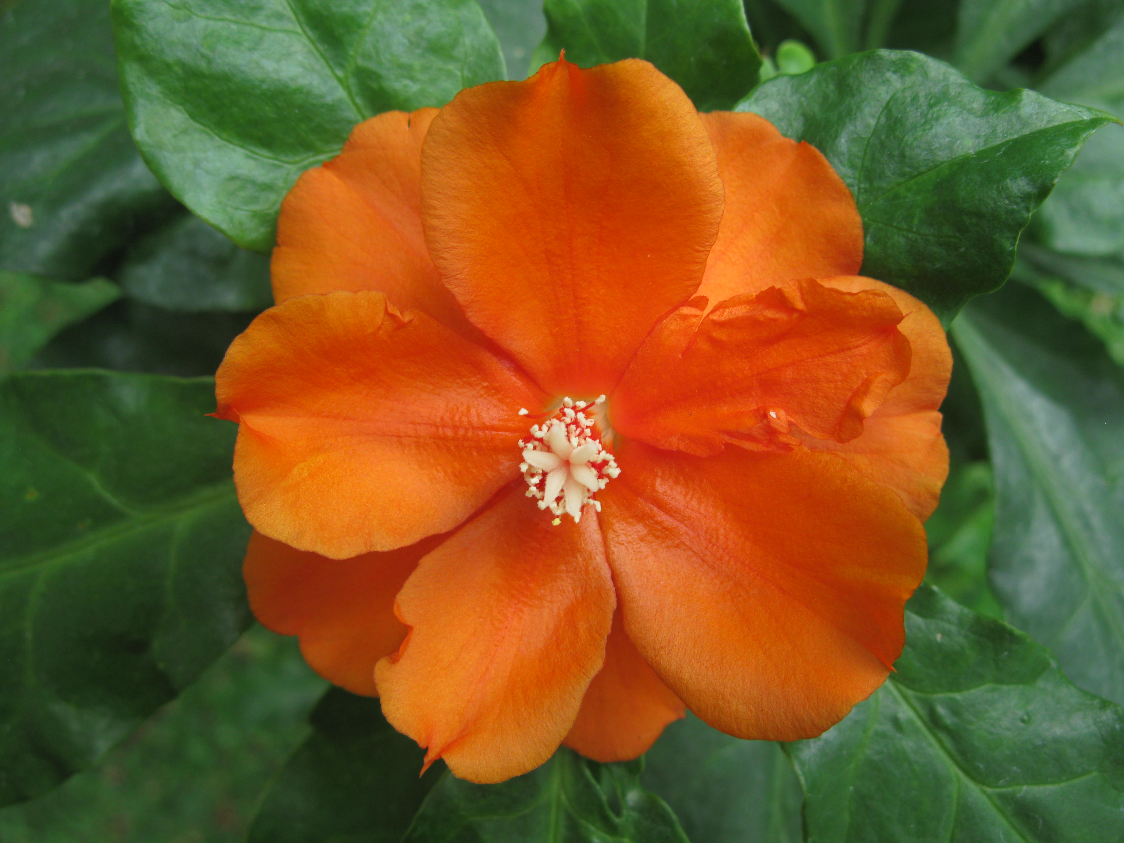 Fleur de "Pereskia bleo (Kunth) DC." épanouissement maximum.